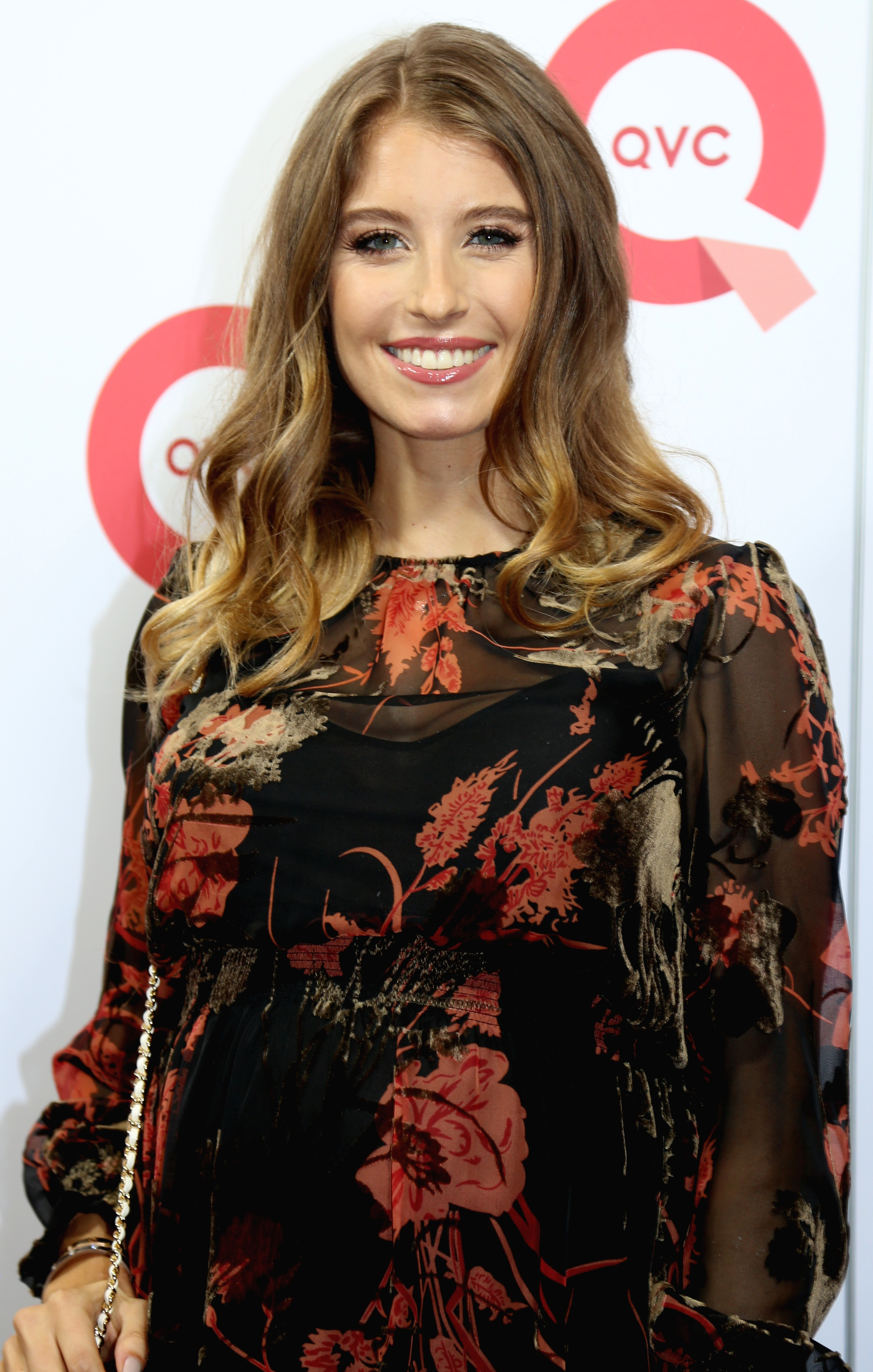 Cathy Hummels beim QVC Fashion-Event zur "VOGUE Fashion's Night Out", am 08.09.2017 in Düsseldorf.